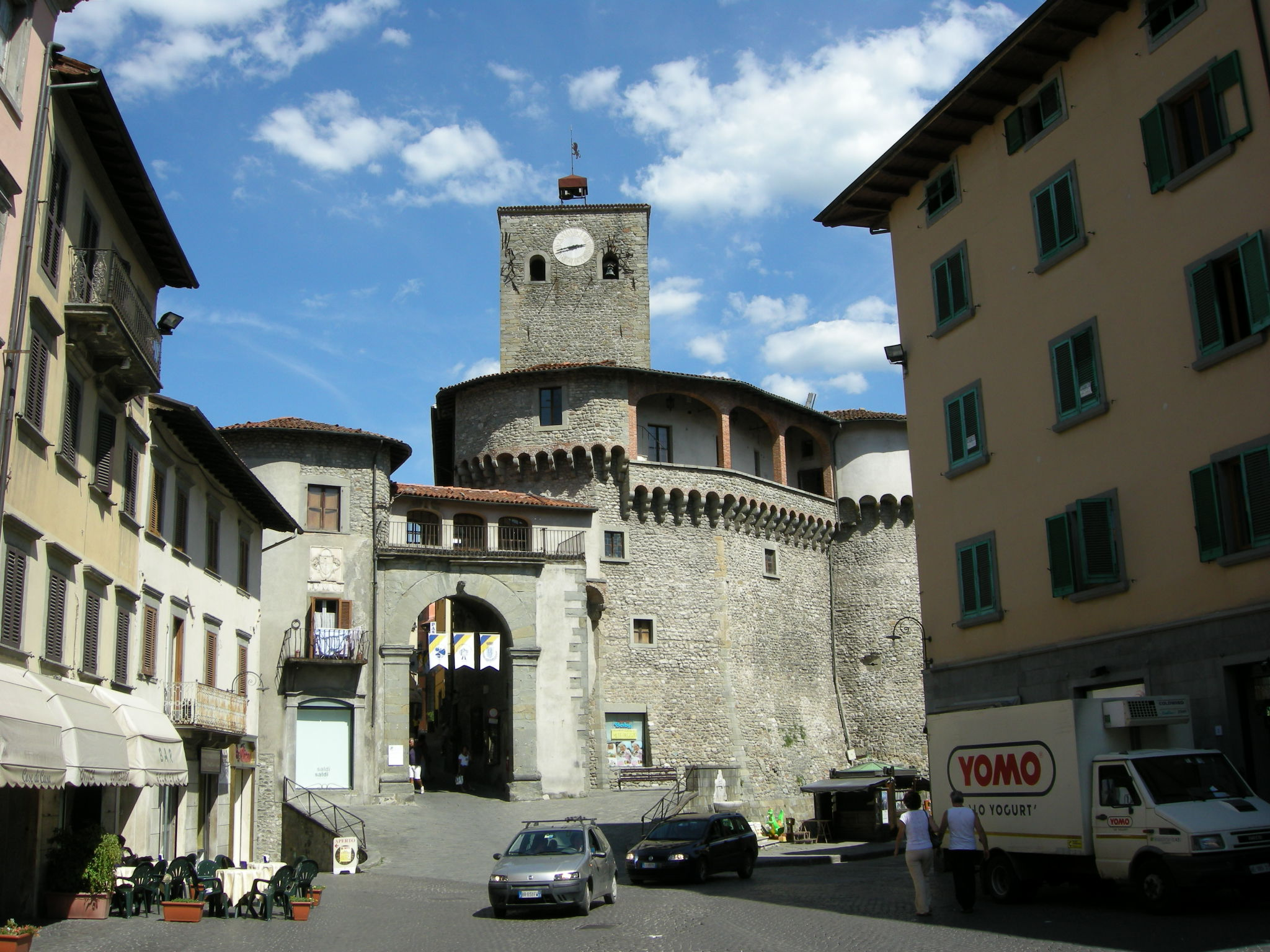 Rocca aroistesca, esterno